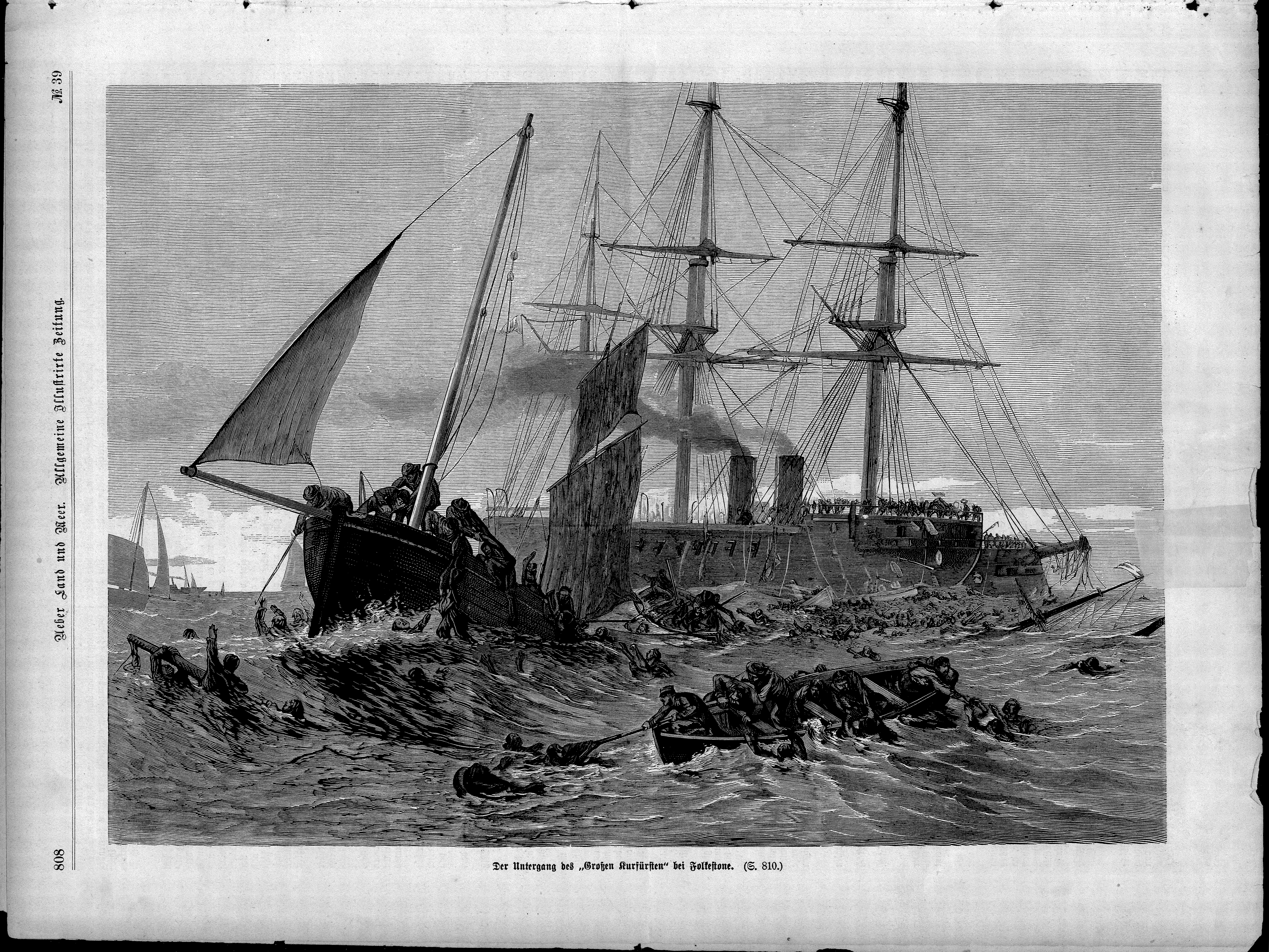 Zeitschrift Über Land und Meer von 1877, Seiten 805 bis 824 (20 Seiten), als Dateinamen jeweils mit einer führenden Null zur automatischen alphanummerischen Sortierung